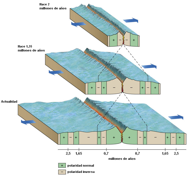 Paleomagnetisme